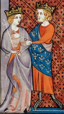 Bertrada und König Philipp I. von Frankreich